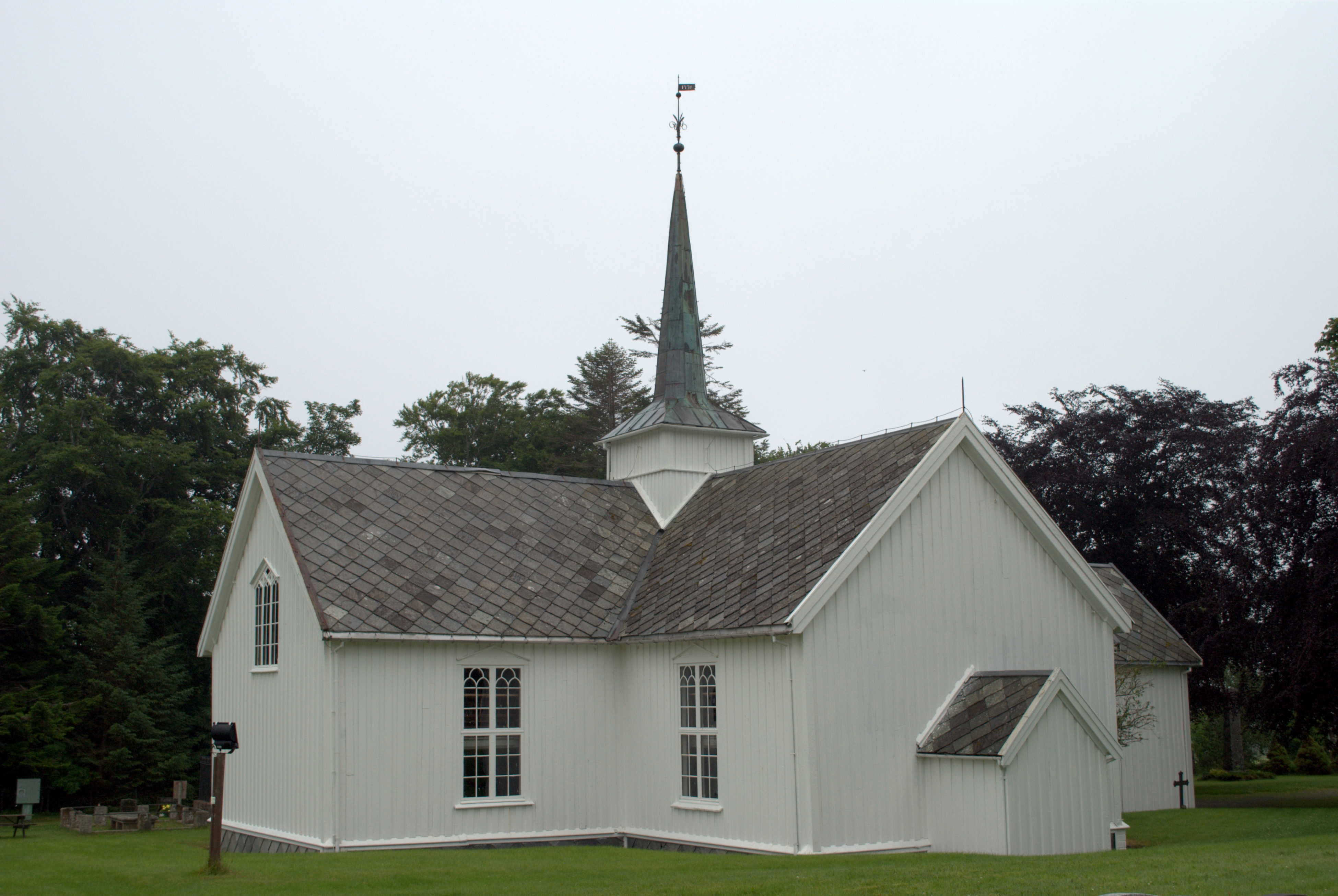 Bremsnes kirke i Averøy, Møre og Romsdal